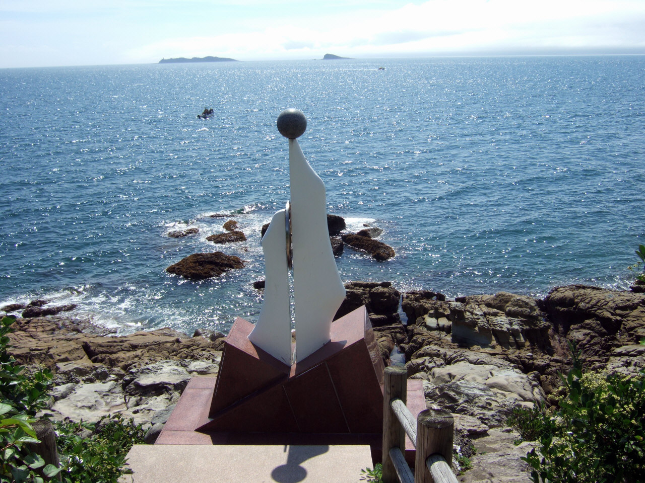 神崎鼻公園の日本本土最西端モニュメント